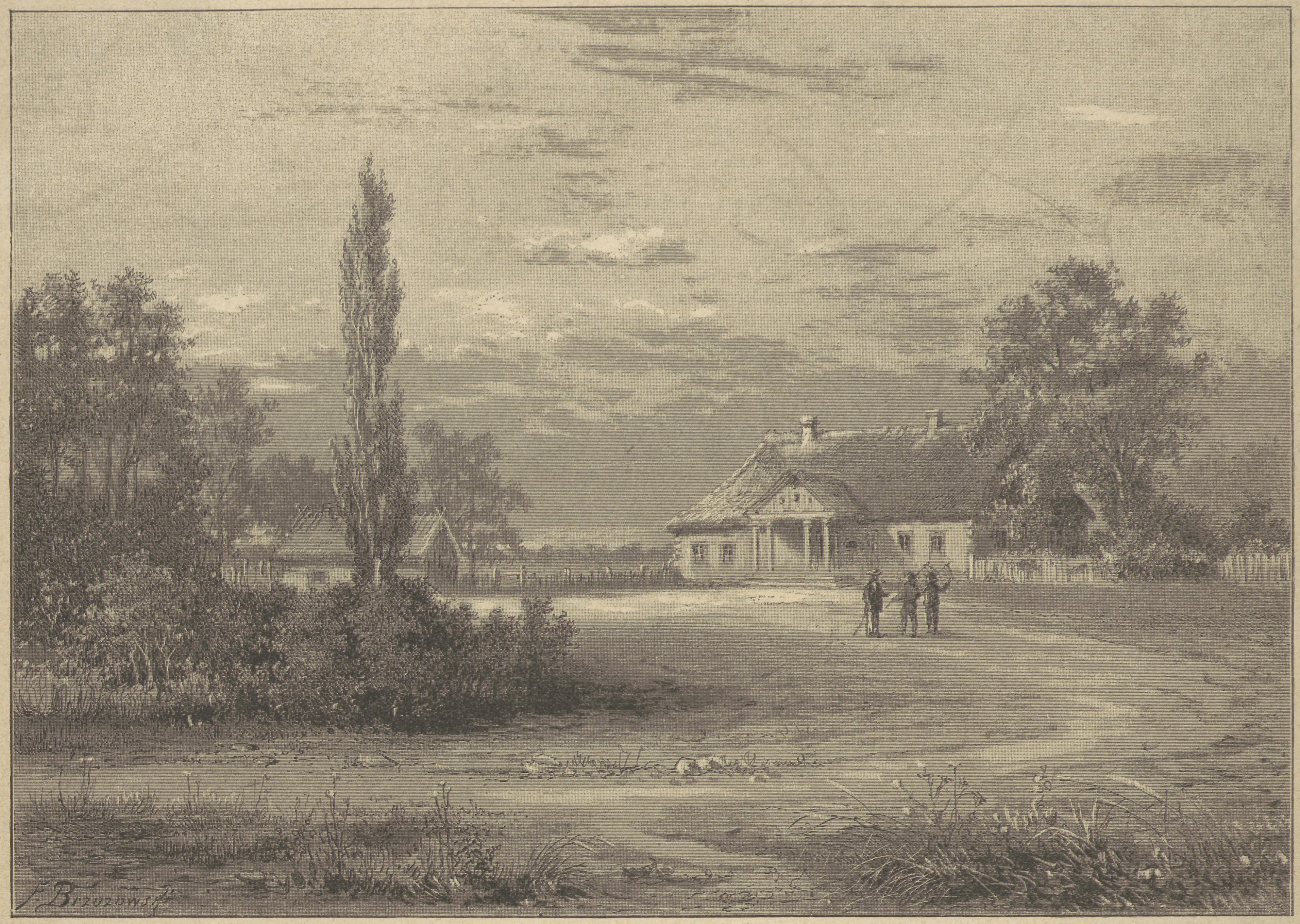 Беларуская (тарашкевіца): Смольгаў (Smolhaŭ), сядзіба Кандратовічаў (Kandratovič)